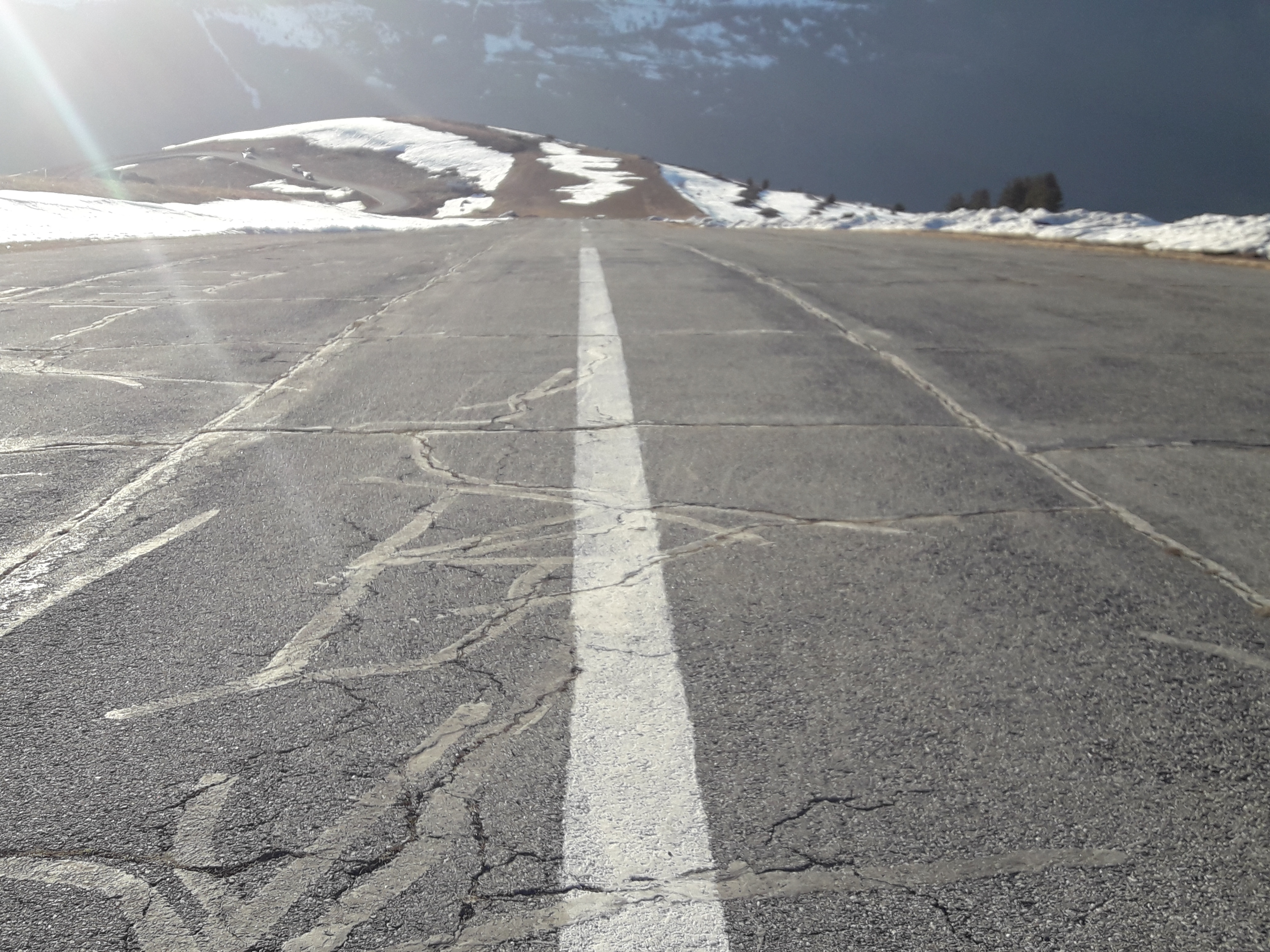 Piste de l'Altiport de Peyresourde-Balestas en février 2017.